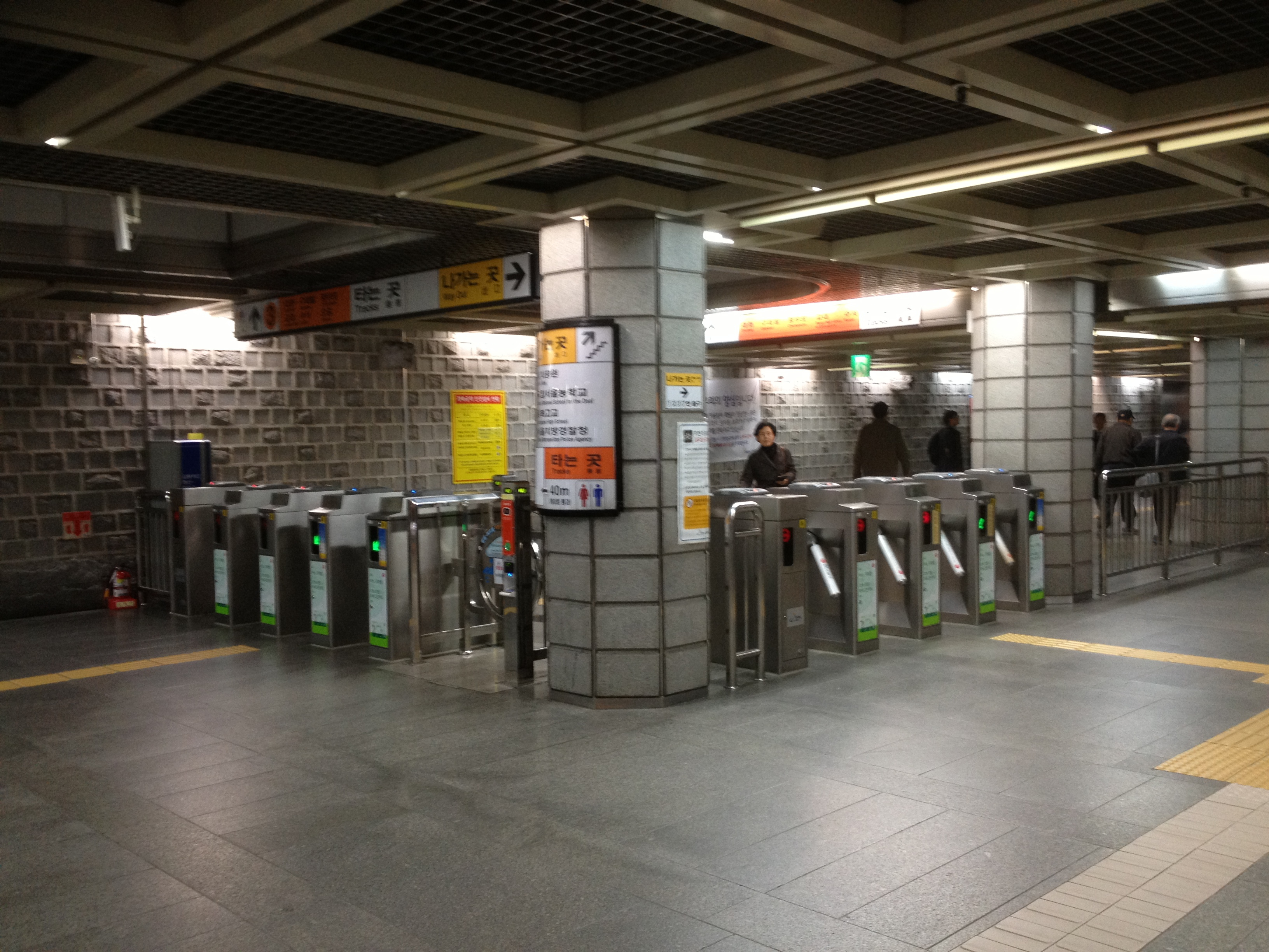 경복궁역 개찰구